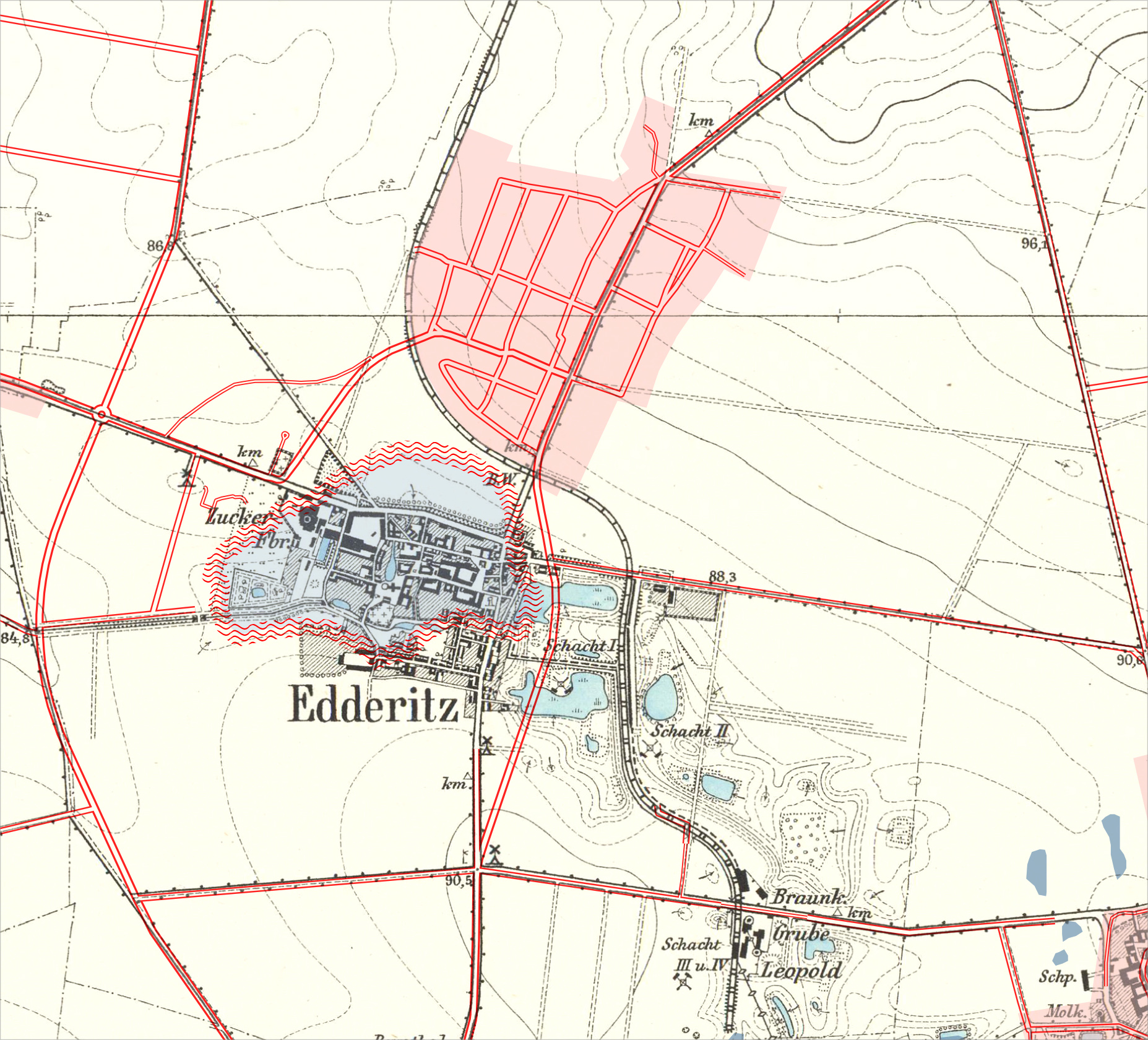 Das alte Edderitz auf einer Karte von 1904 und zum Vergleich die heutige Topografie mit dem Tagebaurestloch (Edderitzer See)